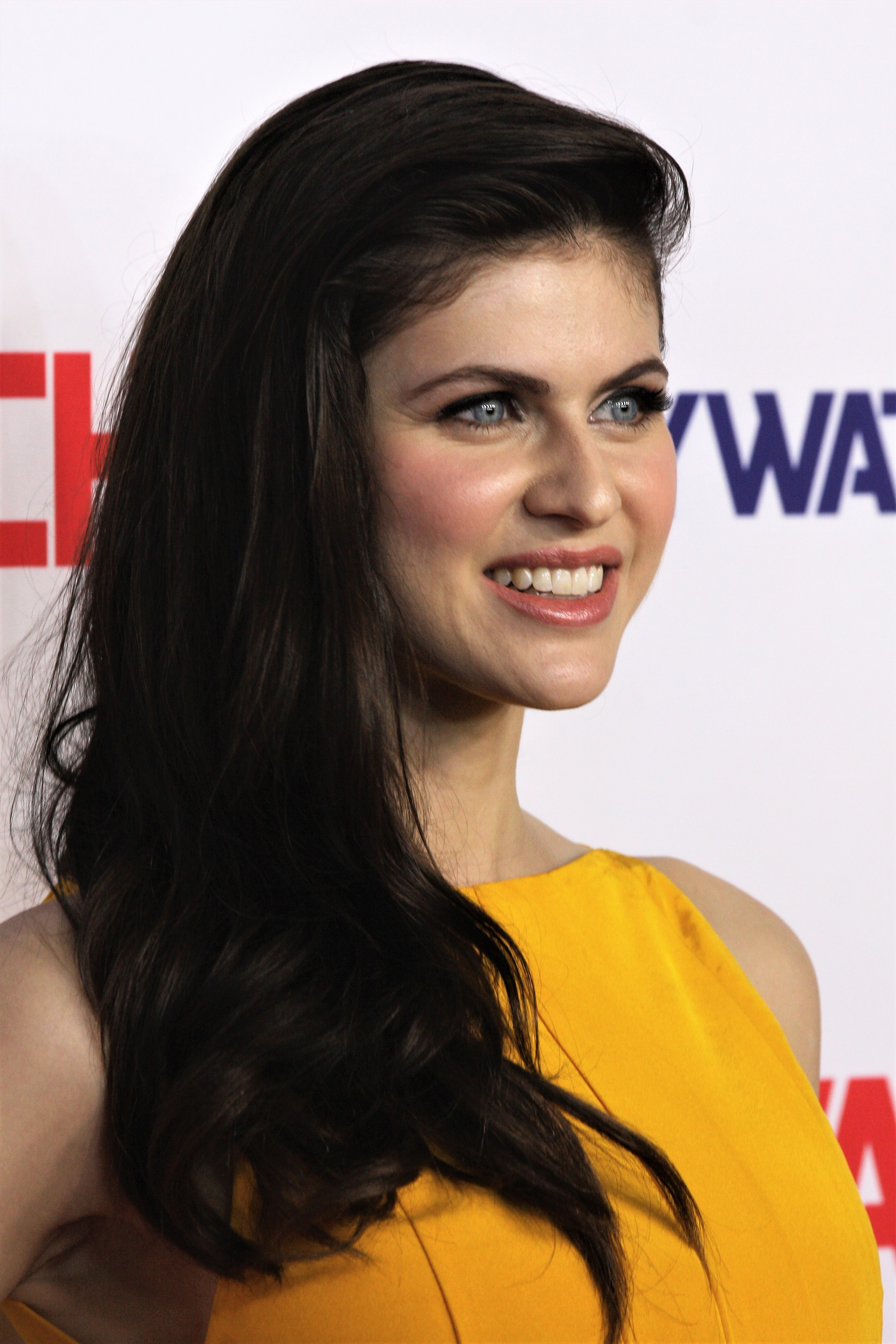 actress Alexandra daddario at the Baywatch premiere in 2017 in Sydney (AUS)